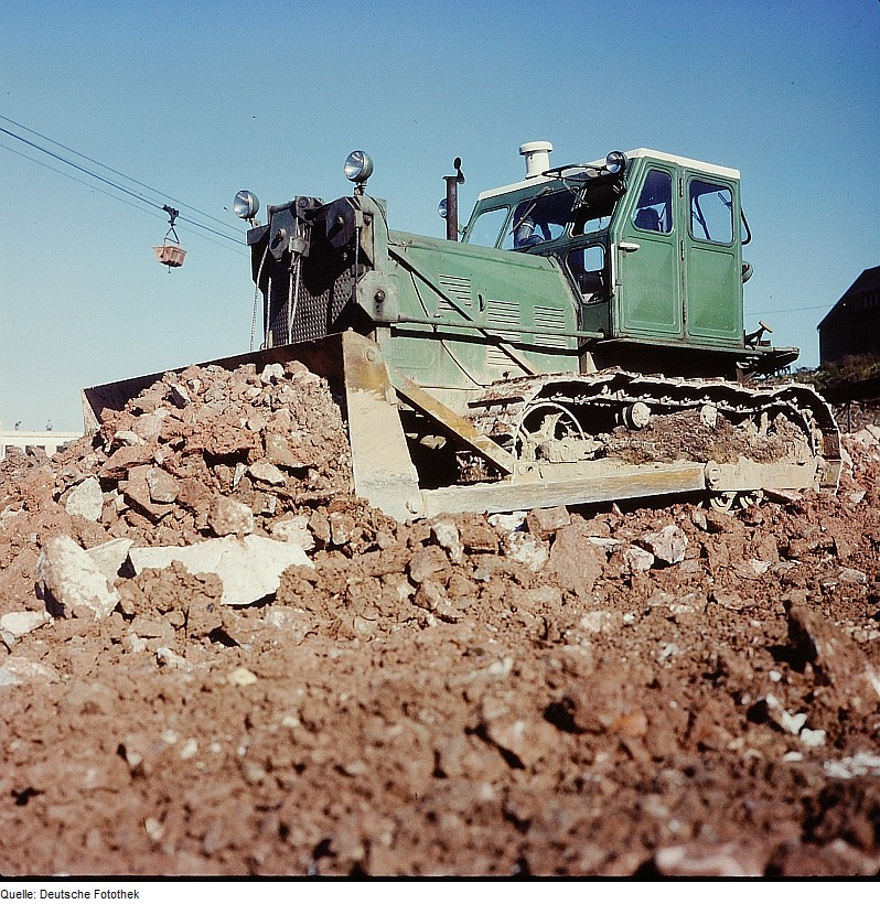 Original image description from the Deutsche Fotothek Baumaschinist